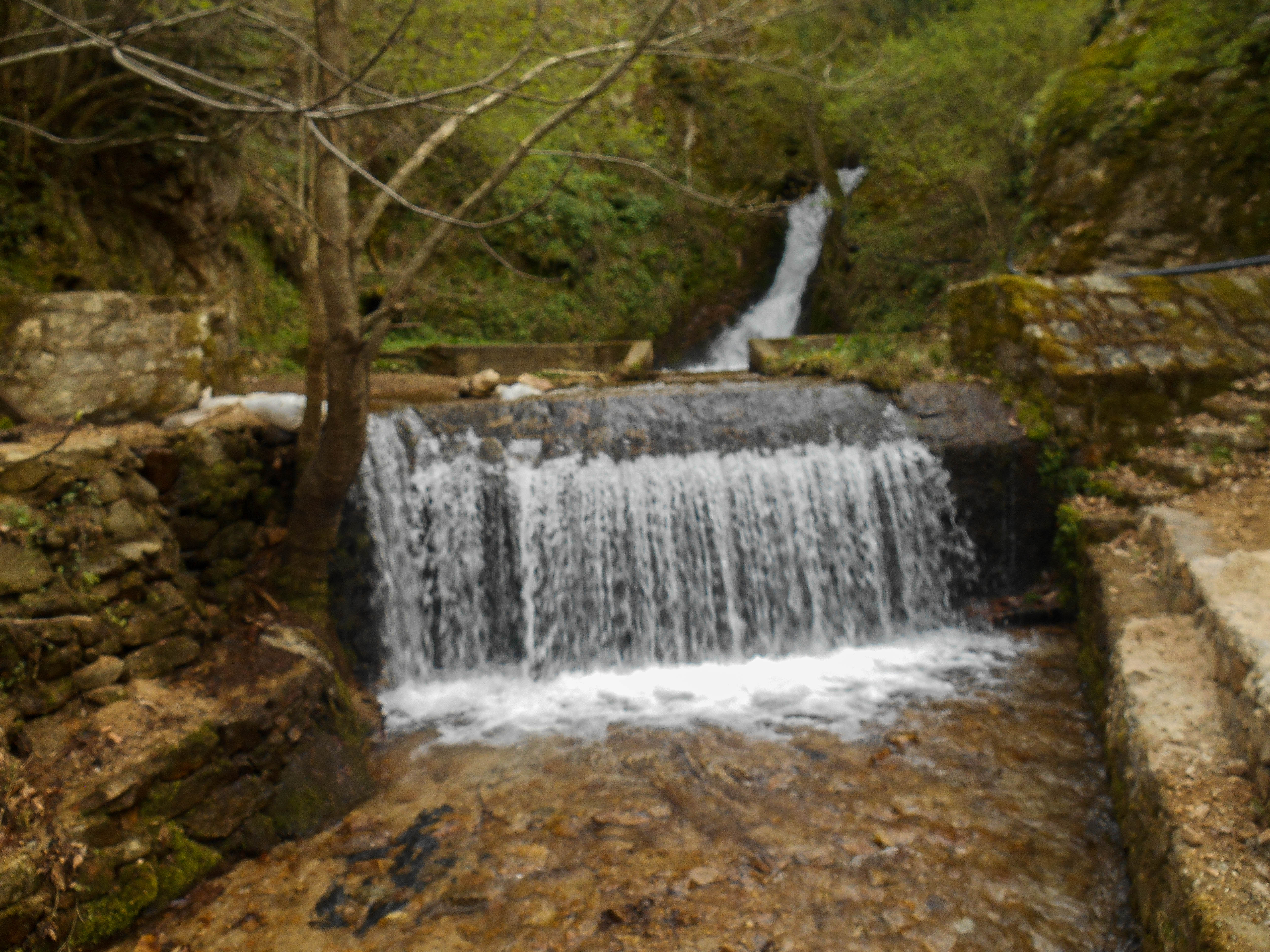 Габровски водопад